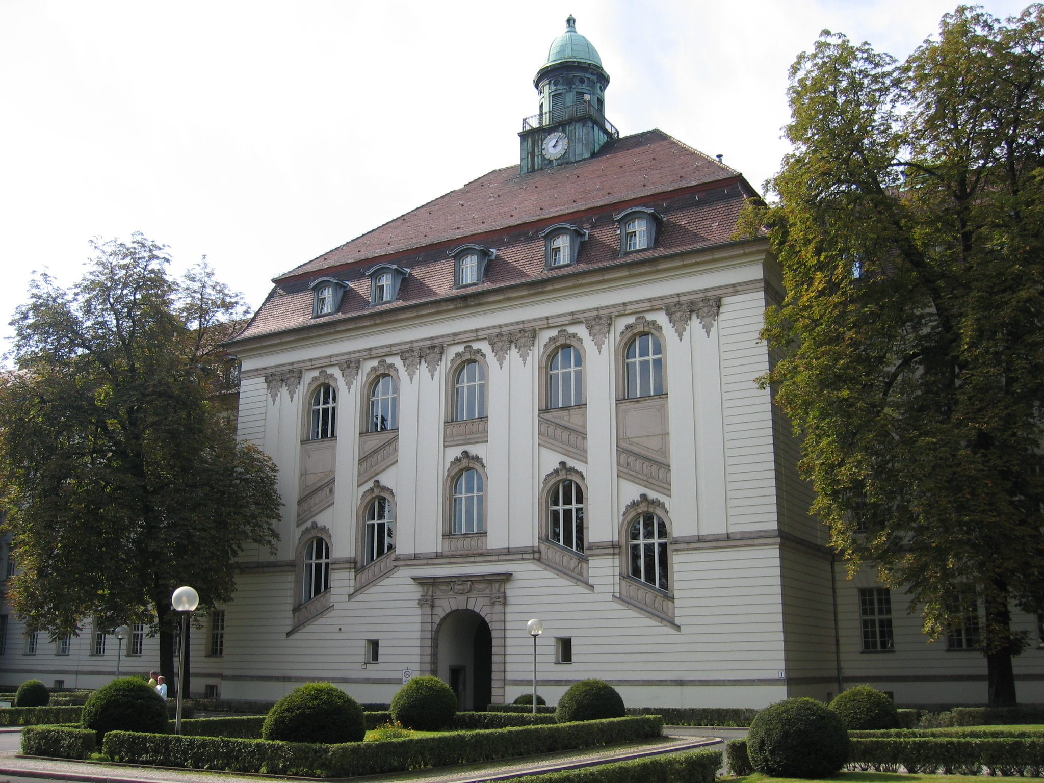 Virchow-Klinikum Berlin, Dt. Herzzentrum